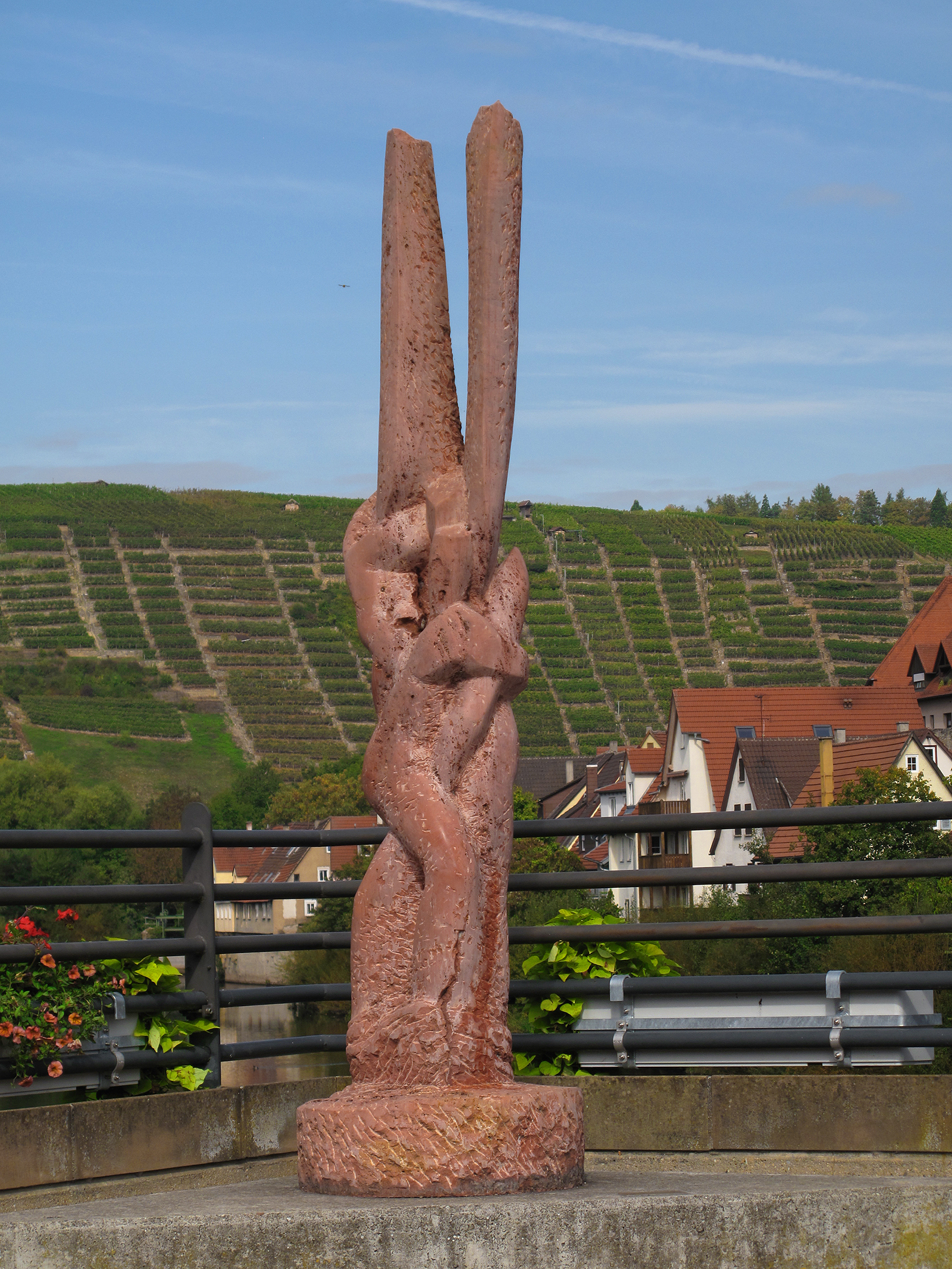 Jörg Failmezger, Jakobskampf (2003) - Besigheimer Skulpturenpfad, Deutschland, Baden-Württemberg, Besigheim